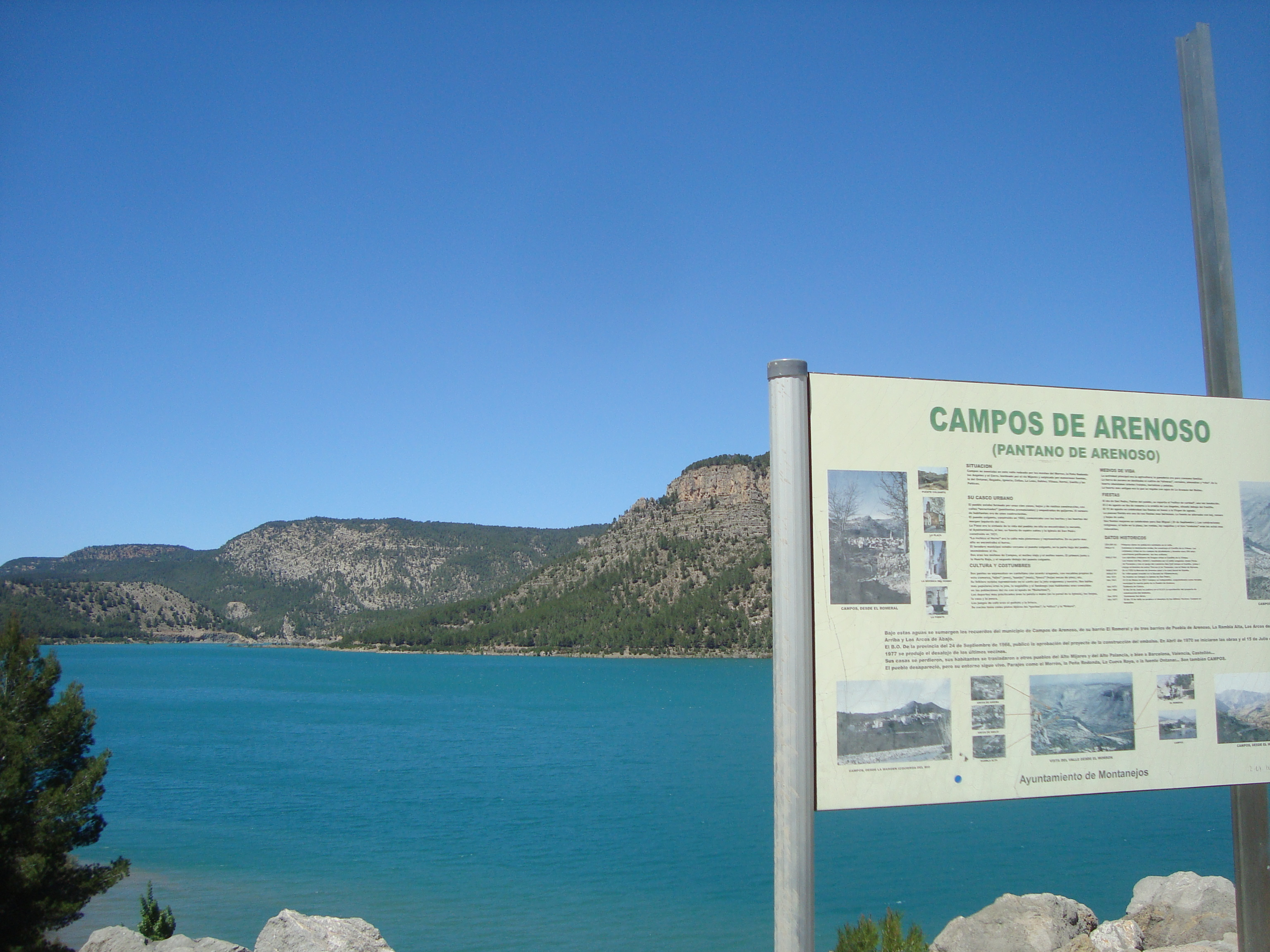 Embalse de Campos de Arenoso-Pantano de Arenós